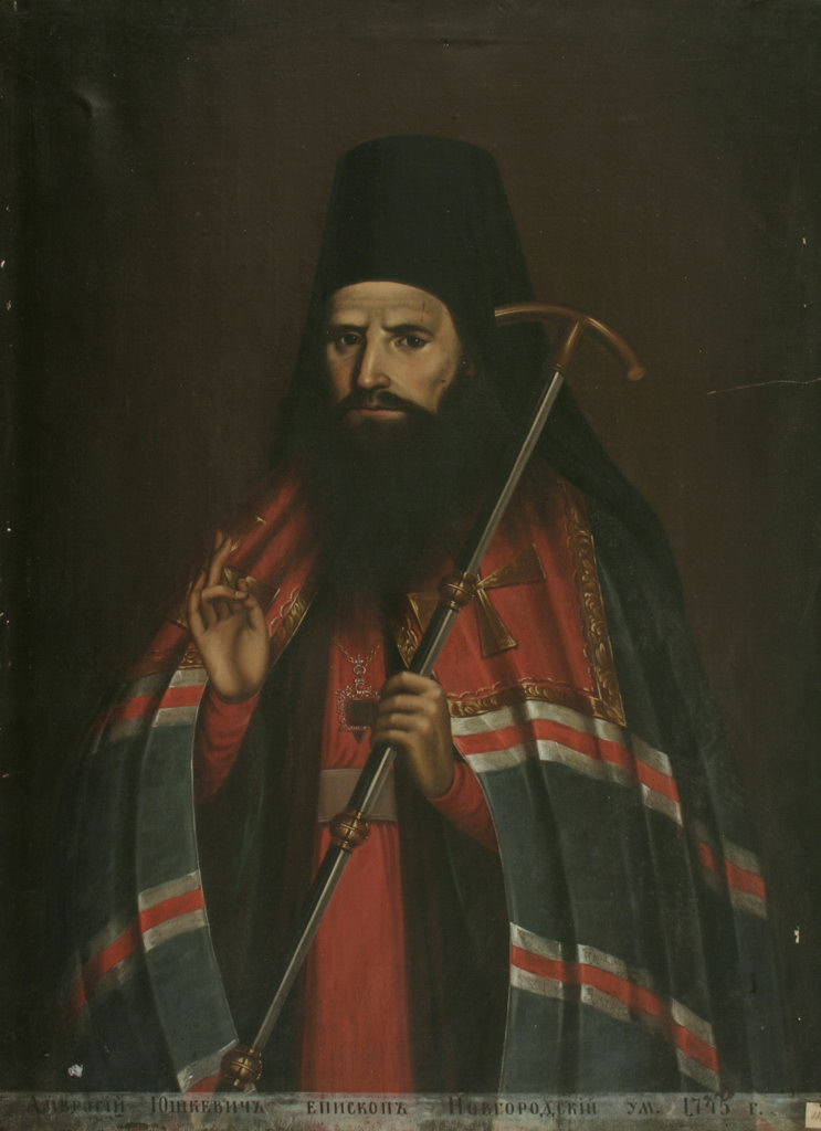 епископ Новгородский Амвросий (Юшкевич)